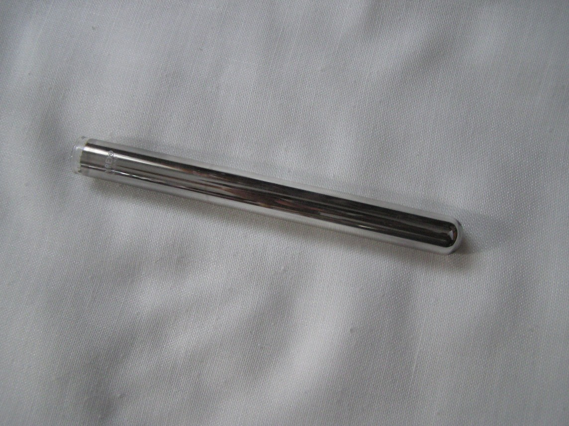 Autore:Von Zurich Fonte:Personale Descrizione: Risultato del Tollens